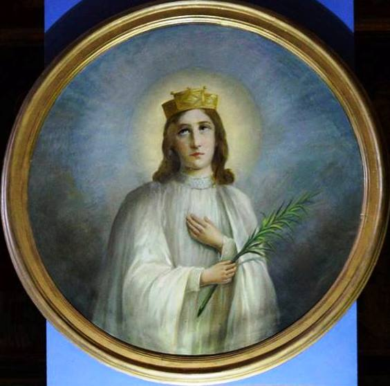 Tela custodita nella chiesa di San Carlo Borromeo, Mortara, Lombardia, Italia